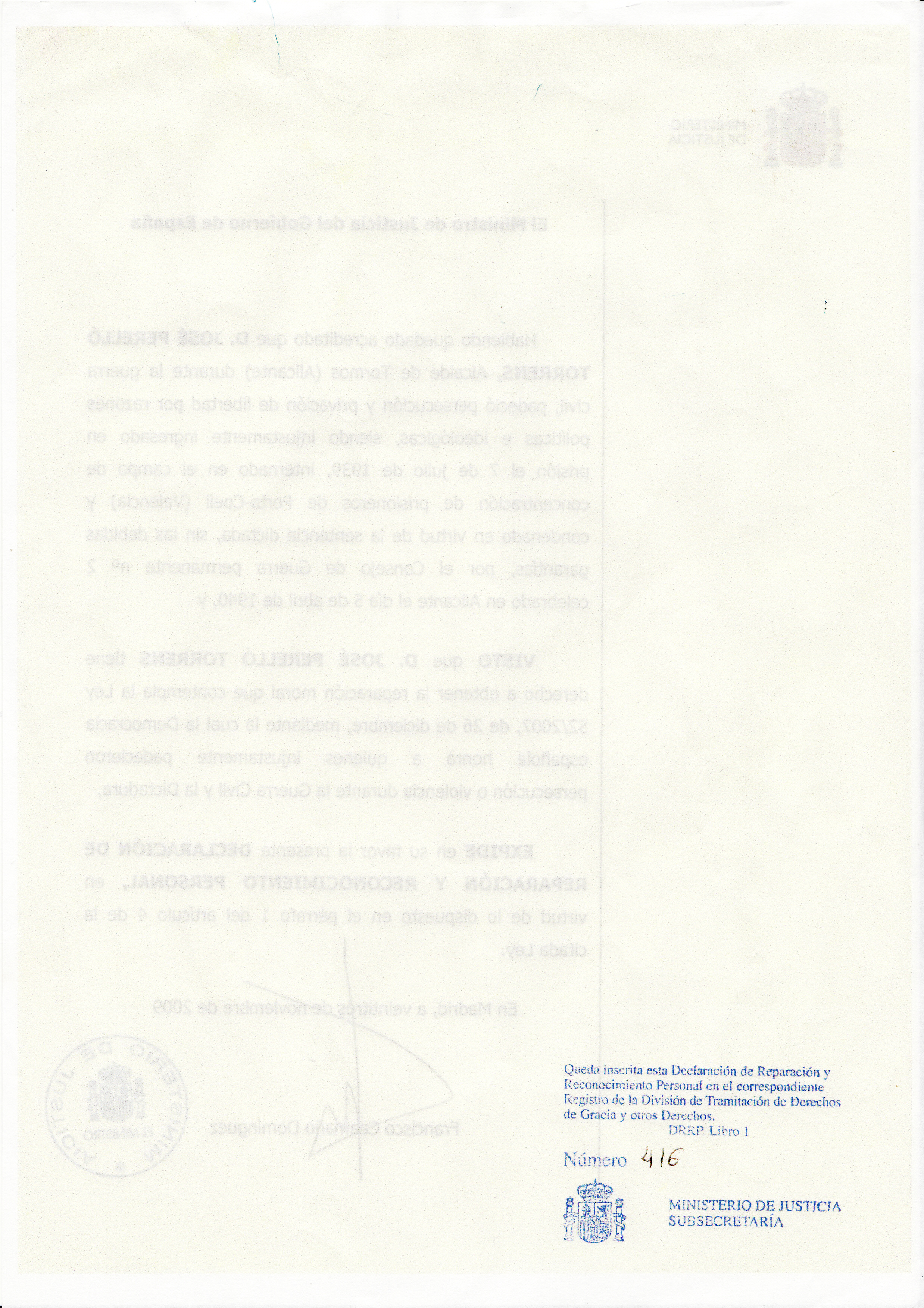 Reparació i rehabilitació 2